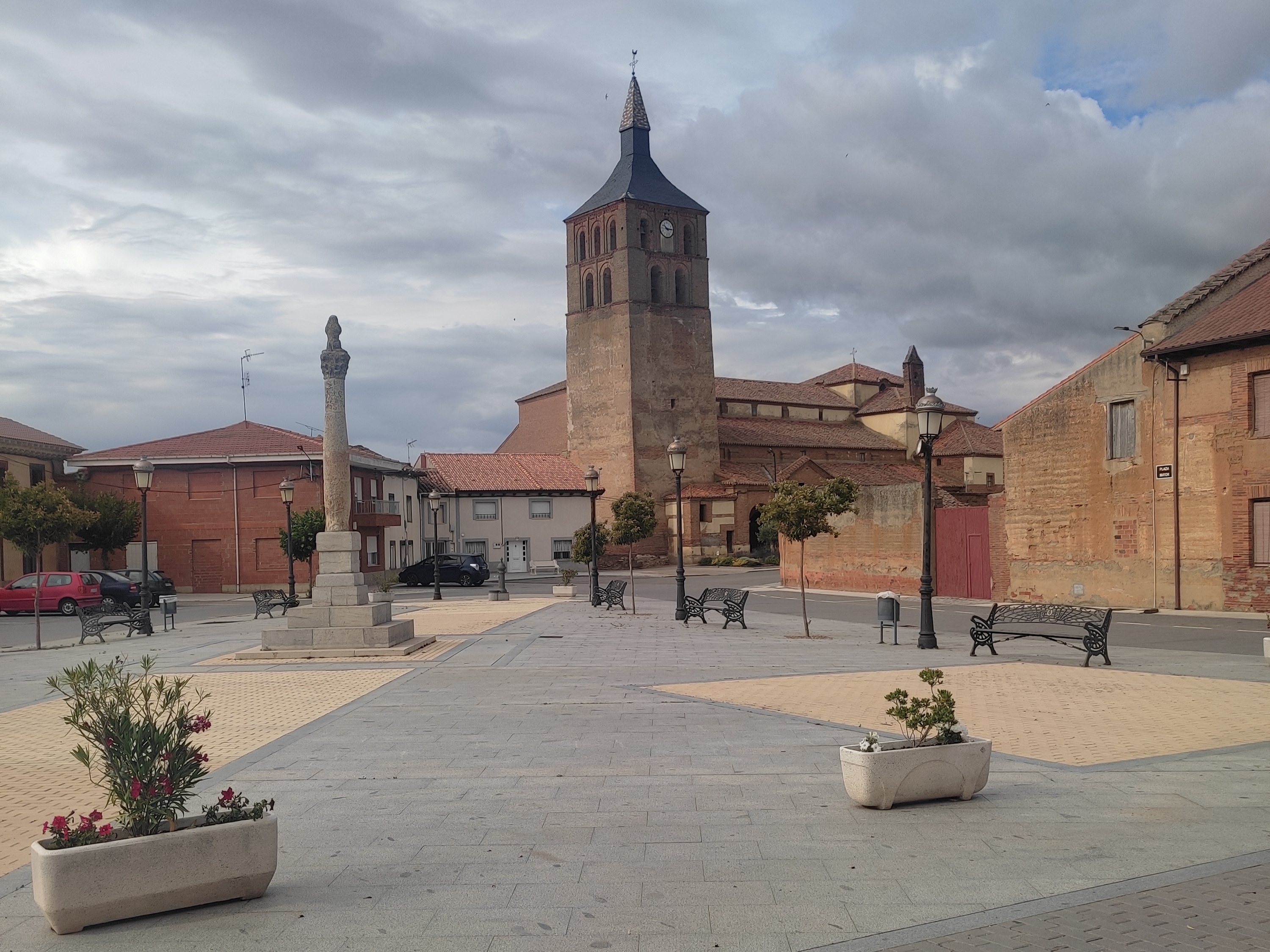 Villademor de la Vega. Plaza Mayor de la villa con rollo de justicia e Iglesia Parroquial de San Pedro Apóstol.